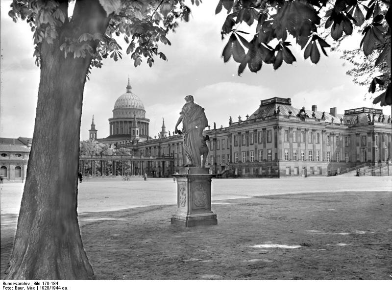 Potsdam.- Blick vom Lustgarten zum Stadtschloß